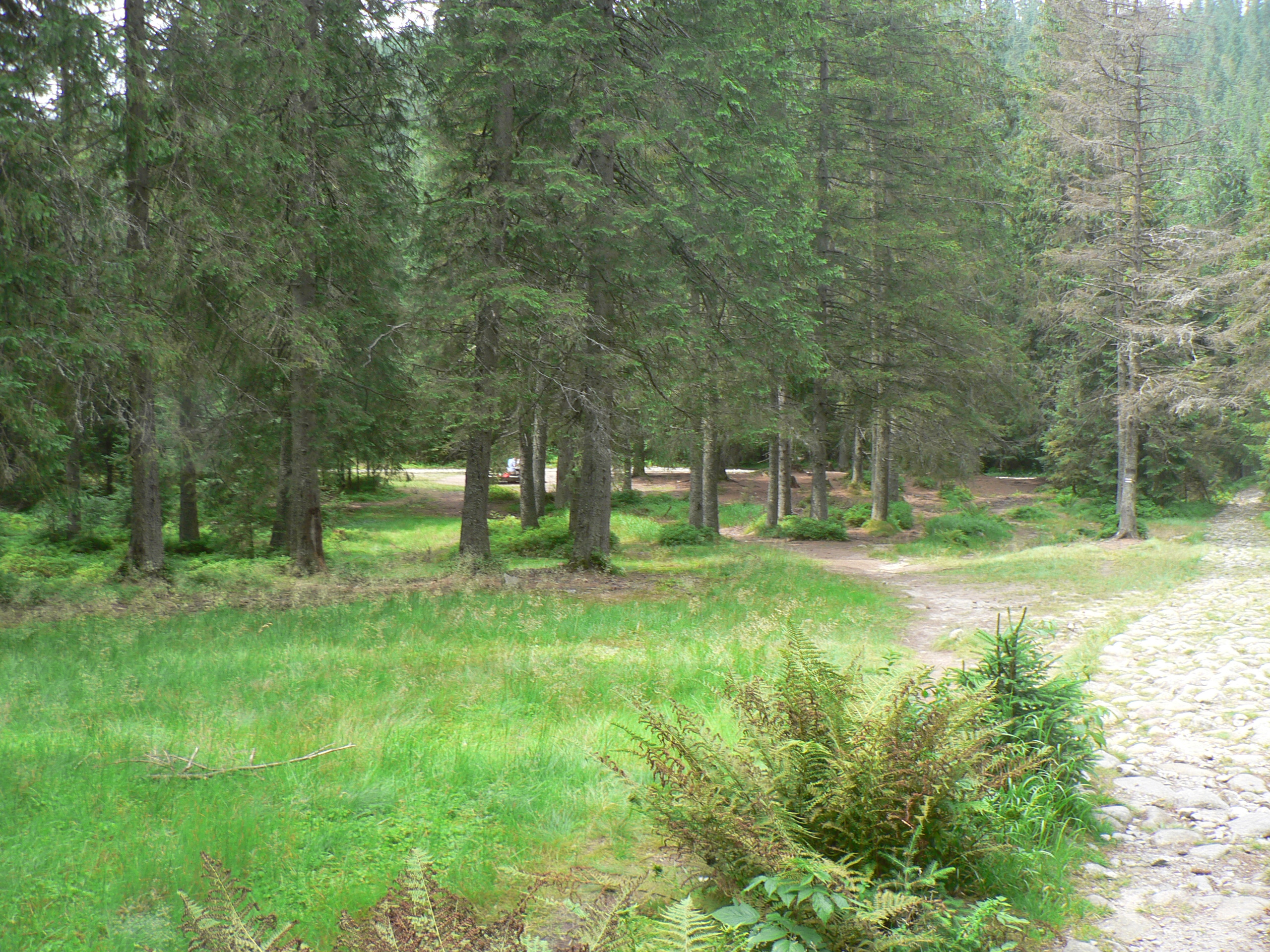 Psia Trawka od strony Równi Waksmundzkiej